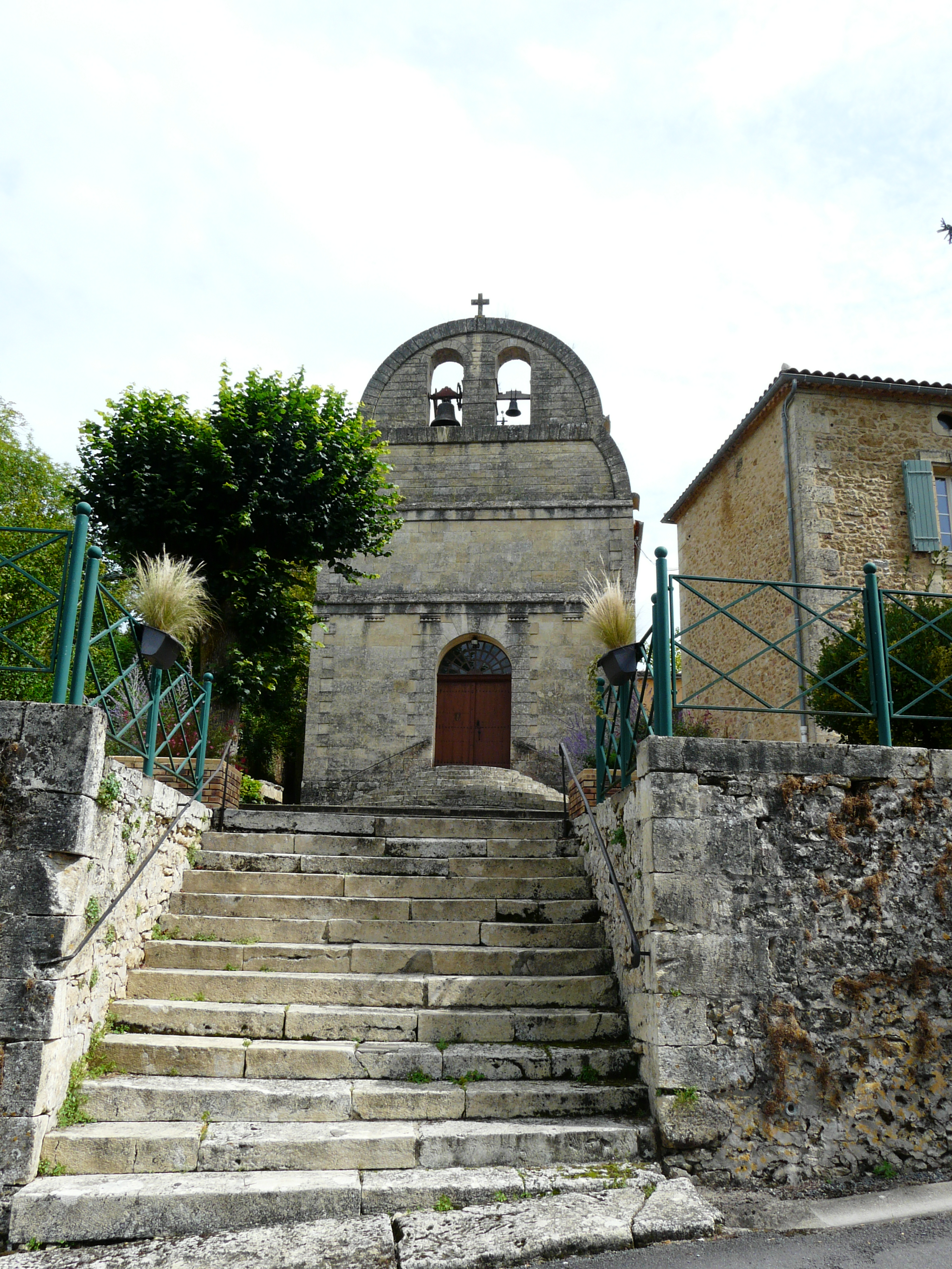 L'église Saint-Pierre-ès-Liens de Bayac, Dordogne, France.